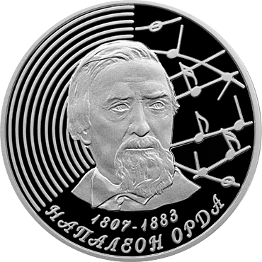 Беларуская (тарашкевіца): Памятная манэта, прысьвечаная 200–годзьдзю з народзінаў Напалеона Орды